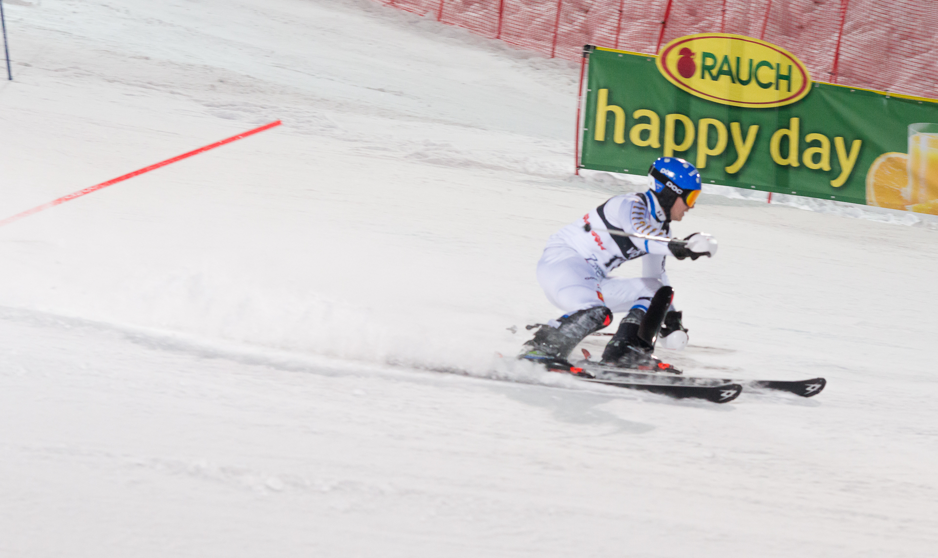 BYGGMARK Jens